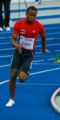 Shawn Crawford während seines 200m Semifinales